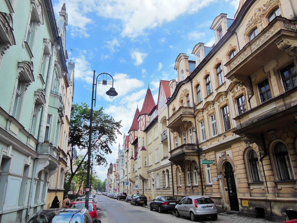 Ulica Cieszkowskiego w Bydgoszczy